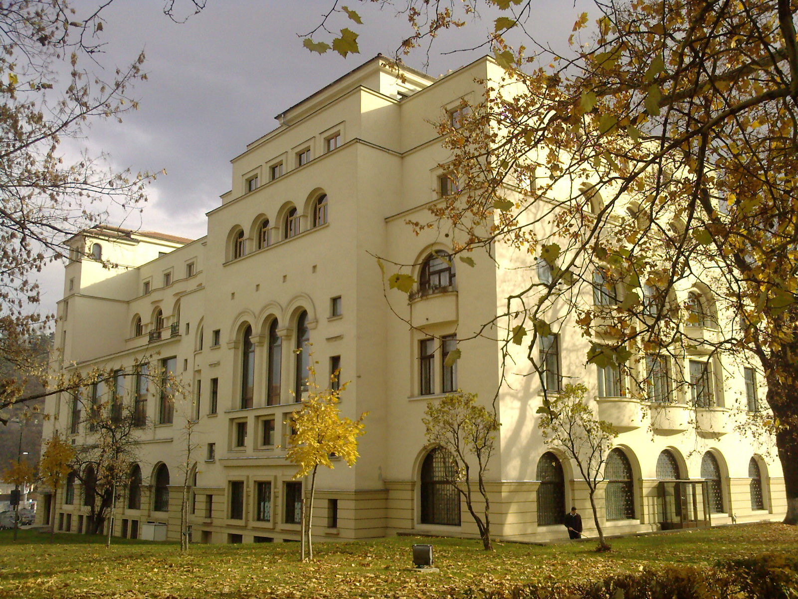 Clădirea Cercului Militar (Casa Armatei) Braşov